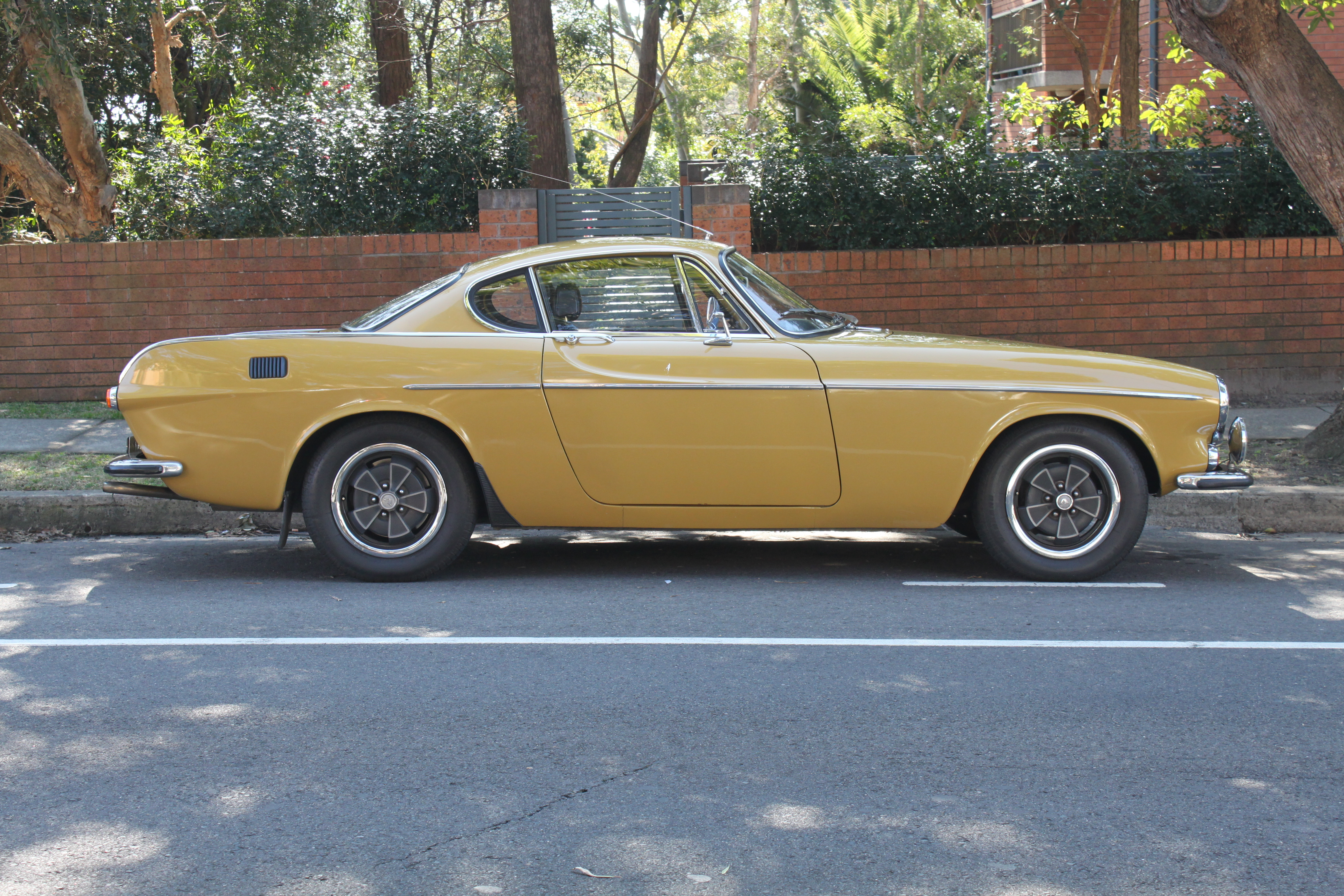 Volvo P1800 E